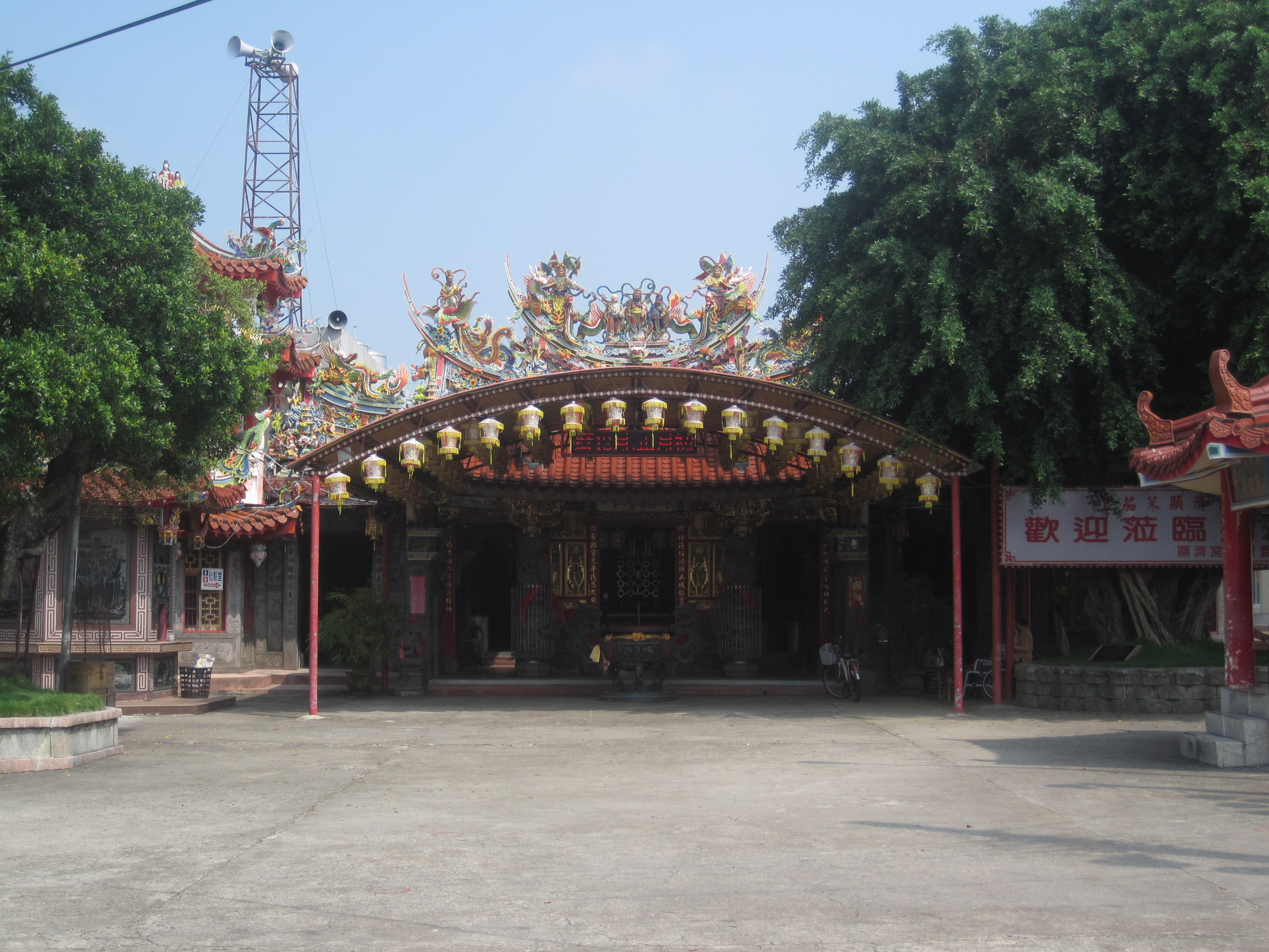 上茄苳顯濟宮